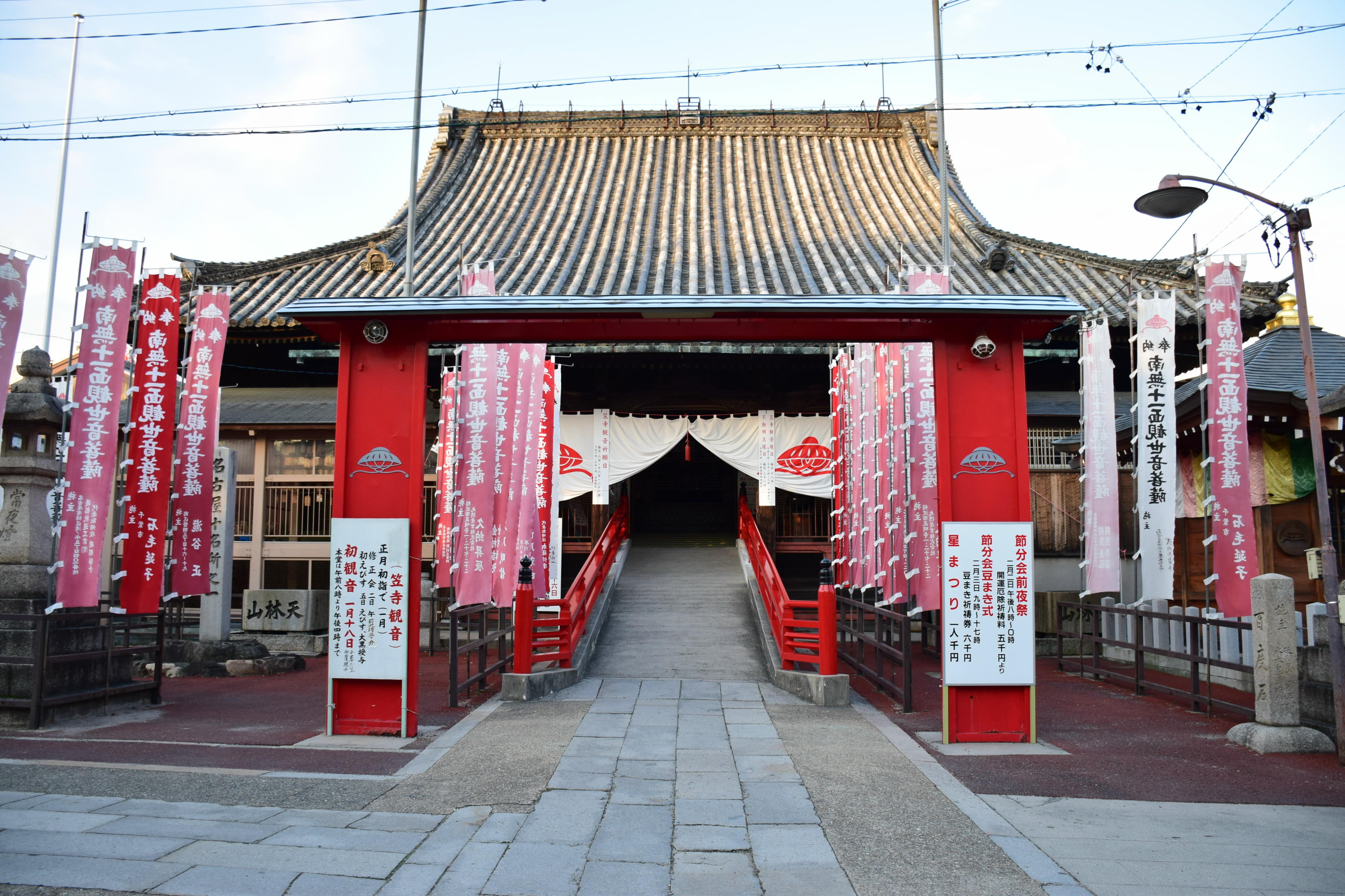 笠寺観音本堂